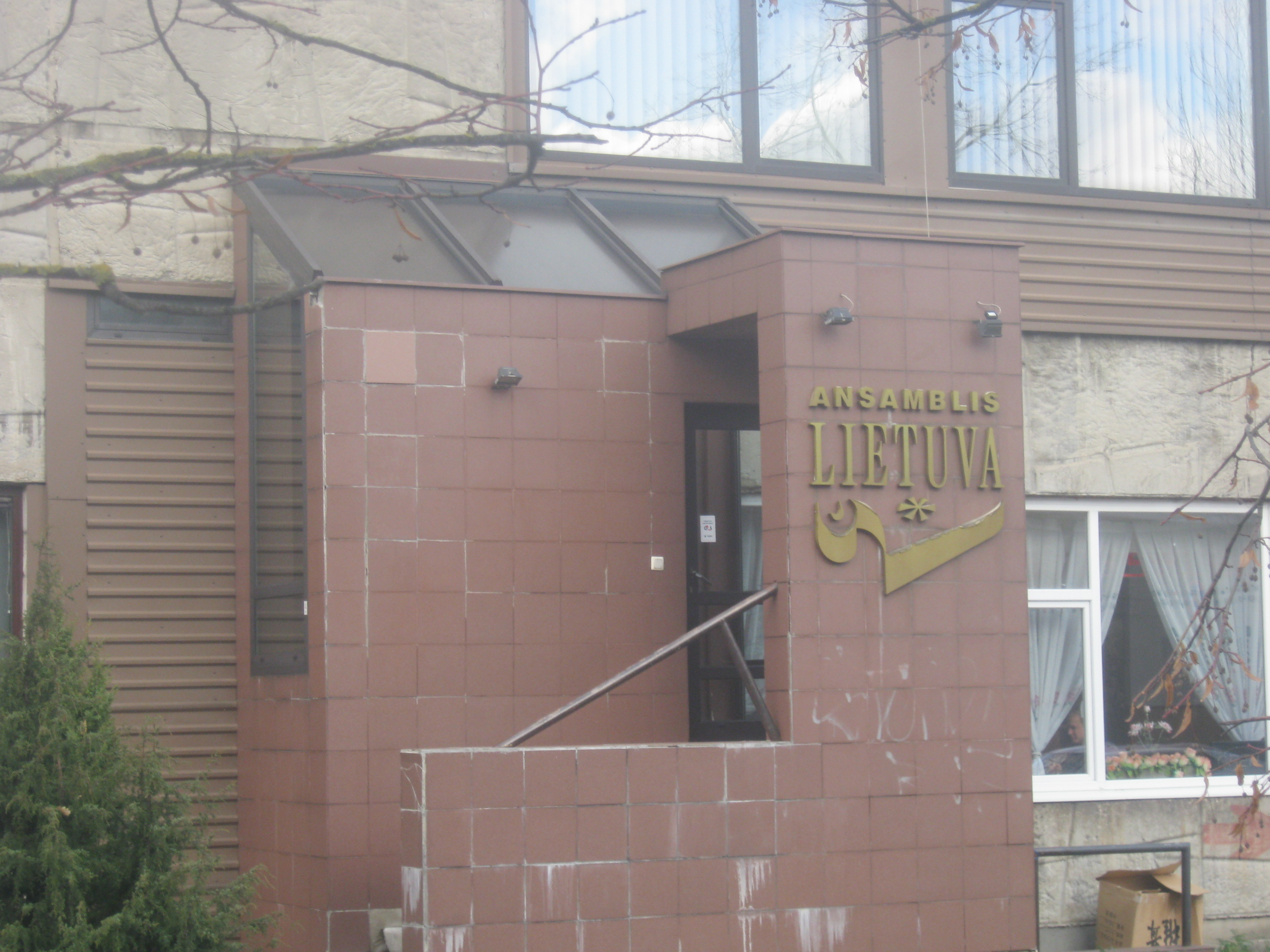 Valstybinis dainų ir šokių ansamblis Lietuva